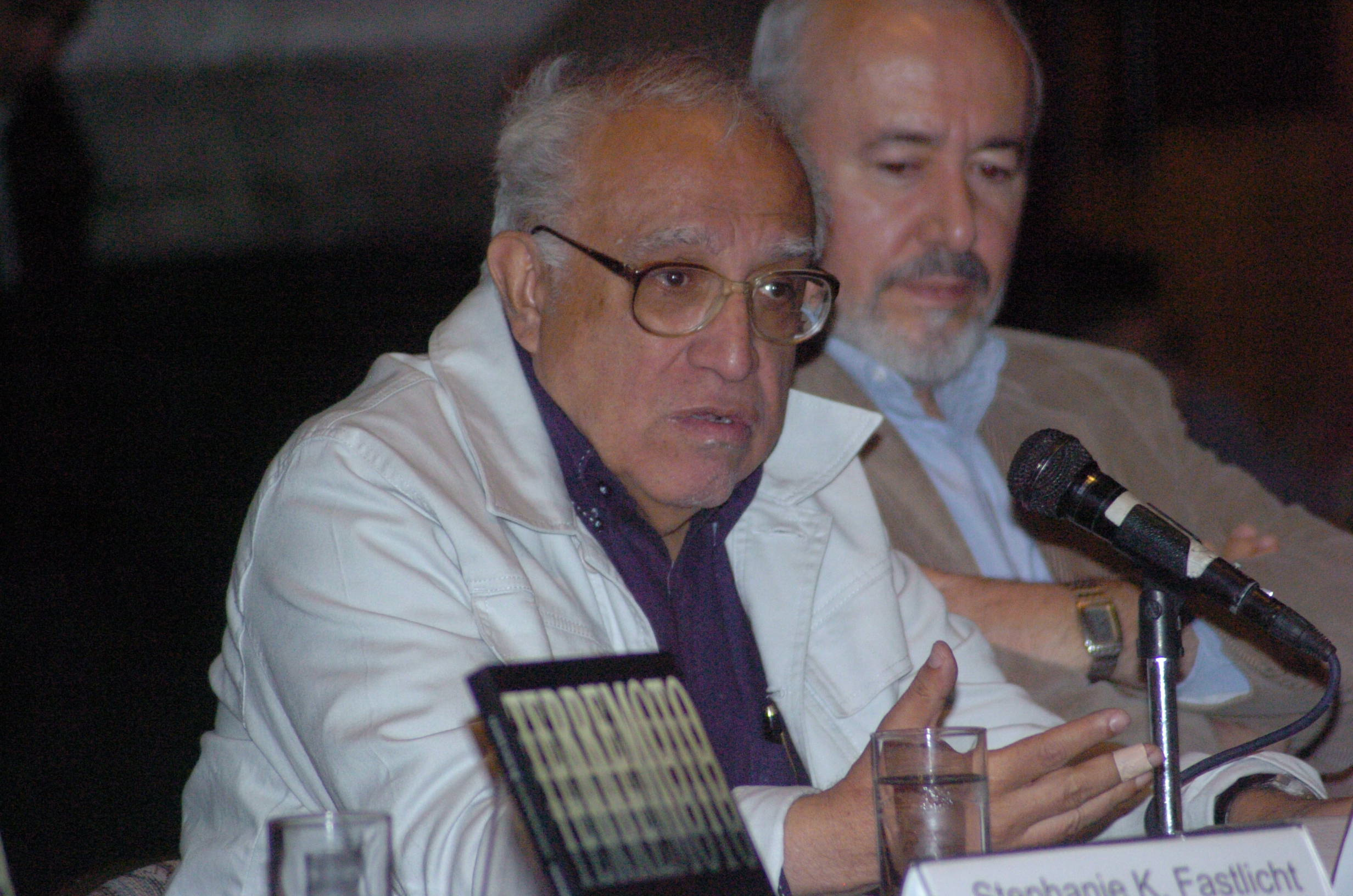 Fotografía antigua de la Ciudad de México resguardadas por el Museo Archivo de la Fotografía (MAF) de la Ciudad de México.